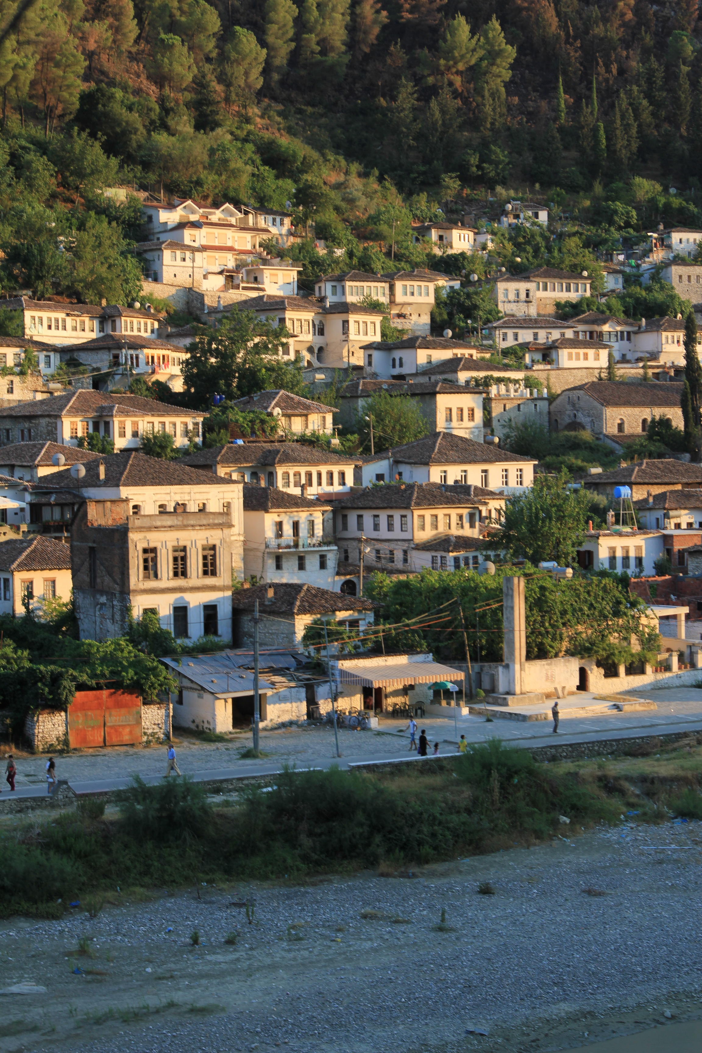 Vue de la ville de Berat, Albanie